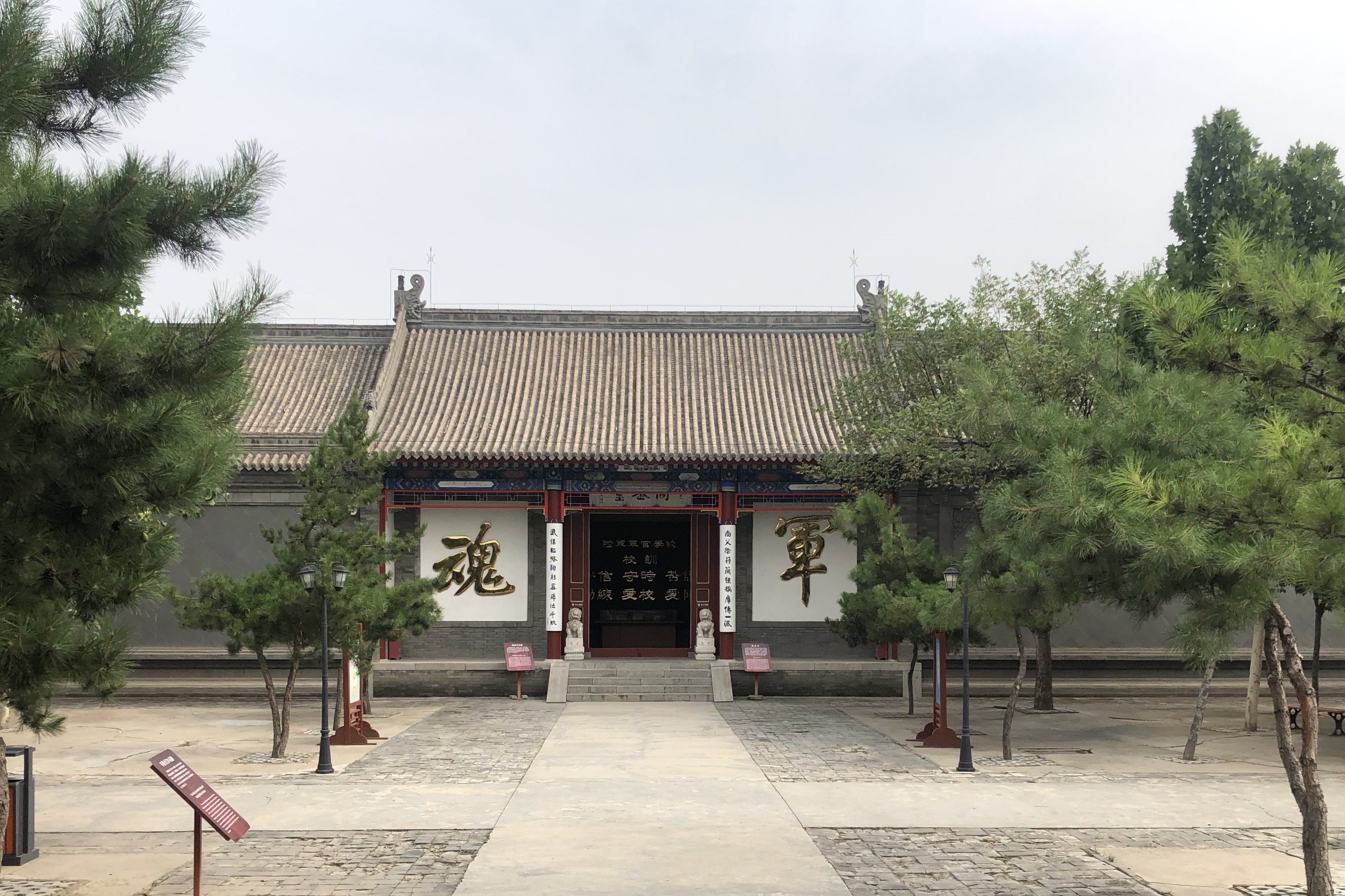 保定陆军学校博物馆内庭